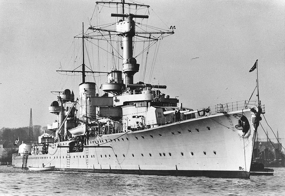 Leichter Kreuzer Königsberg